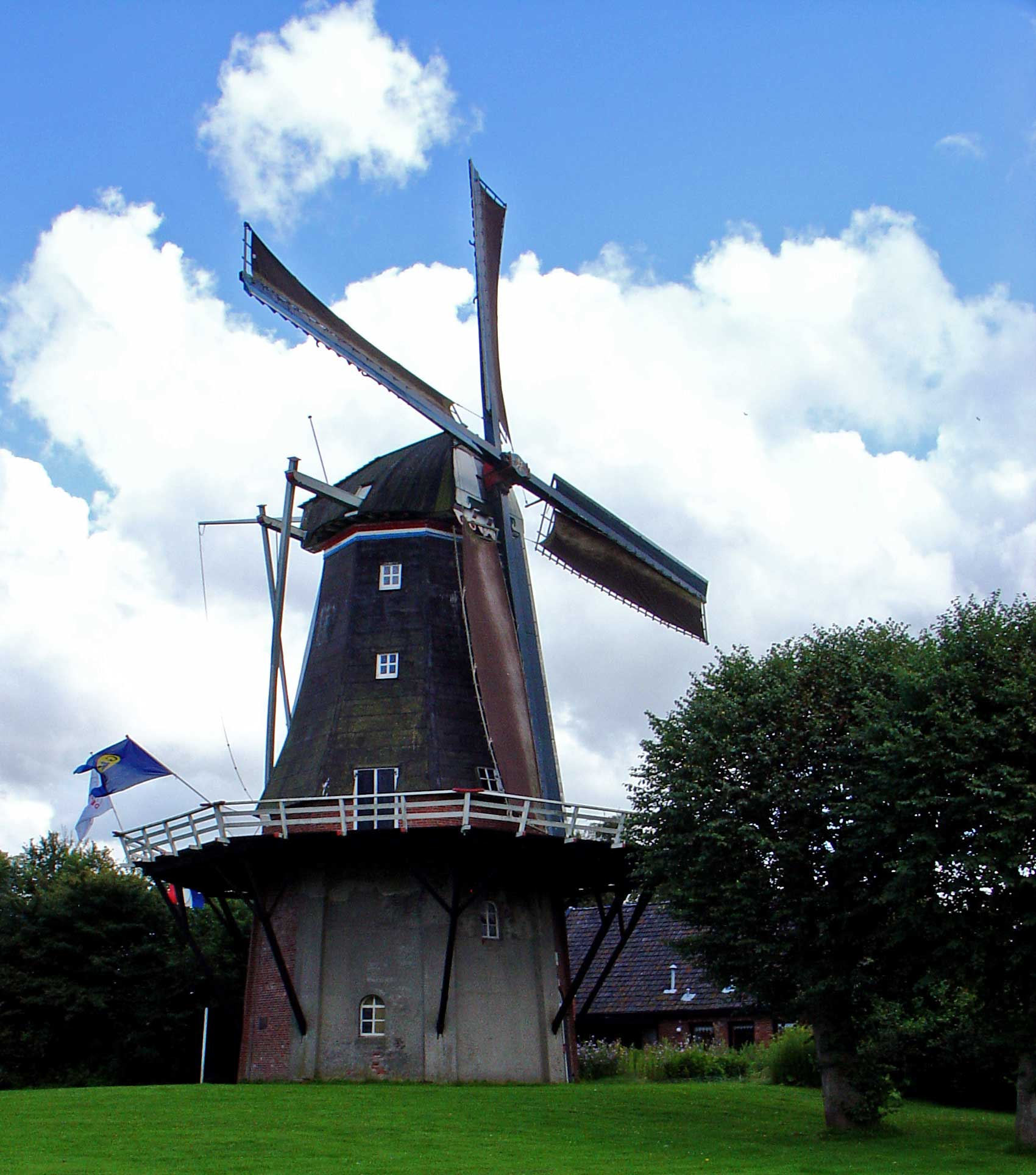 molen 'de vier winden' in Pieterburen